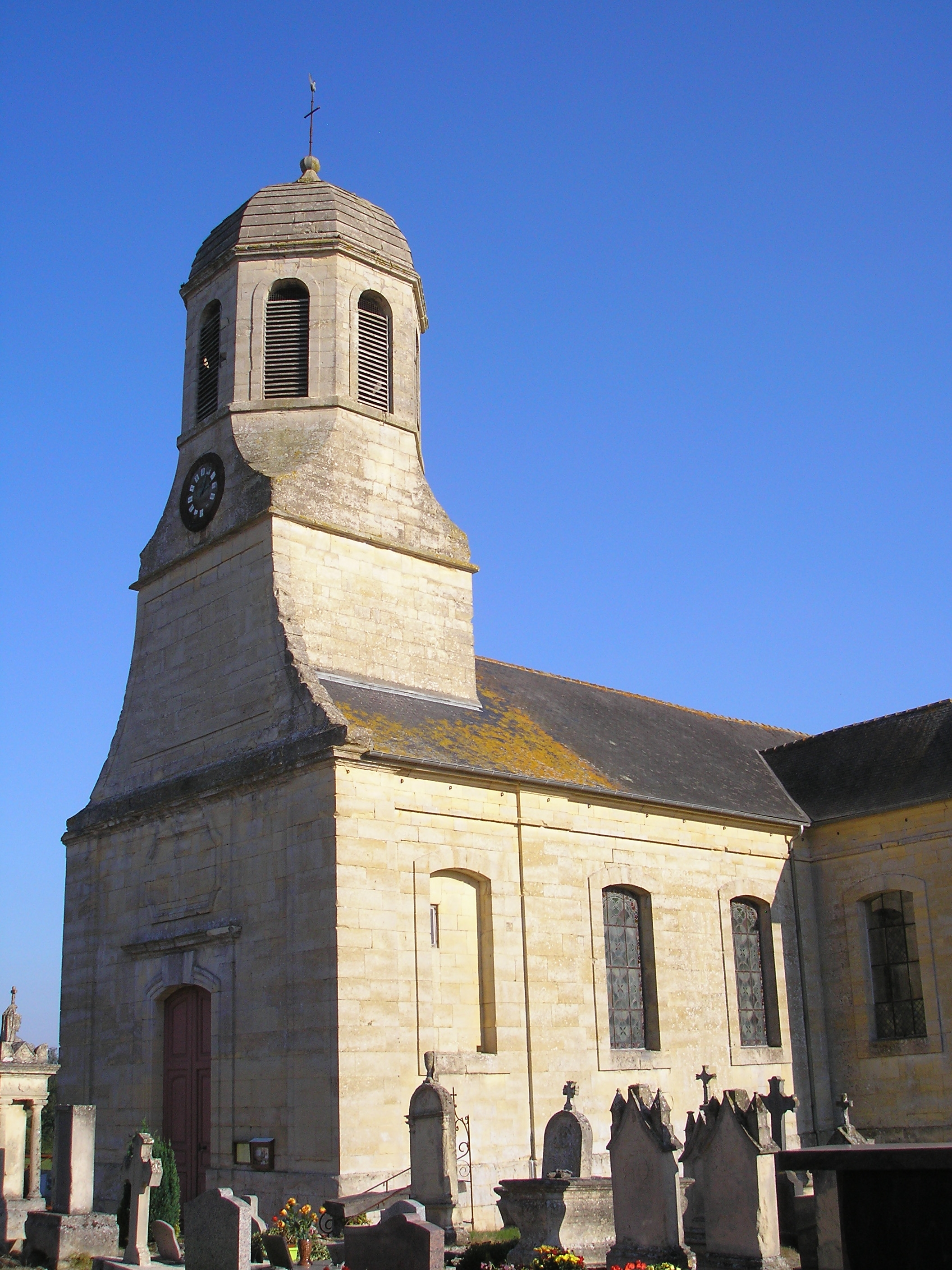 Sainte-Croix-Grand-Tonne (Normandie, France). L'église Sainte-Croix.